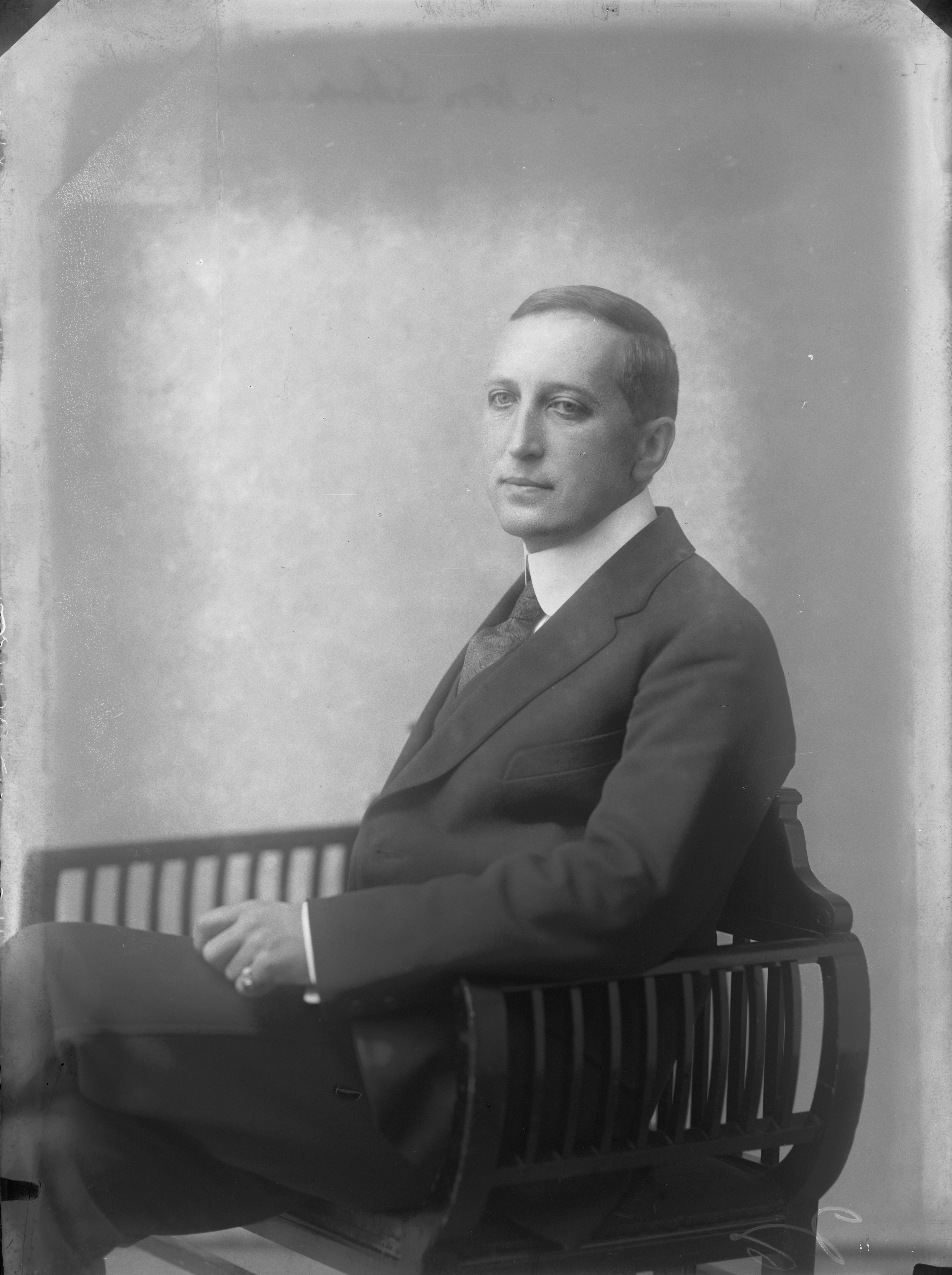 Axel Haartman